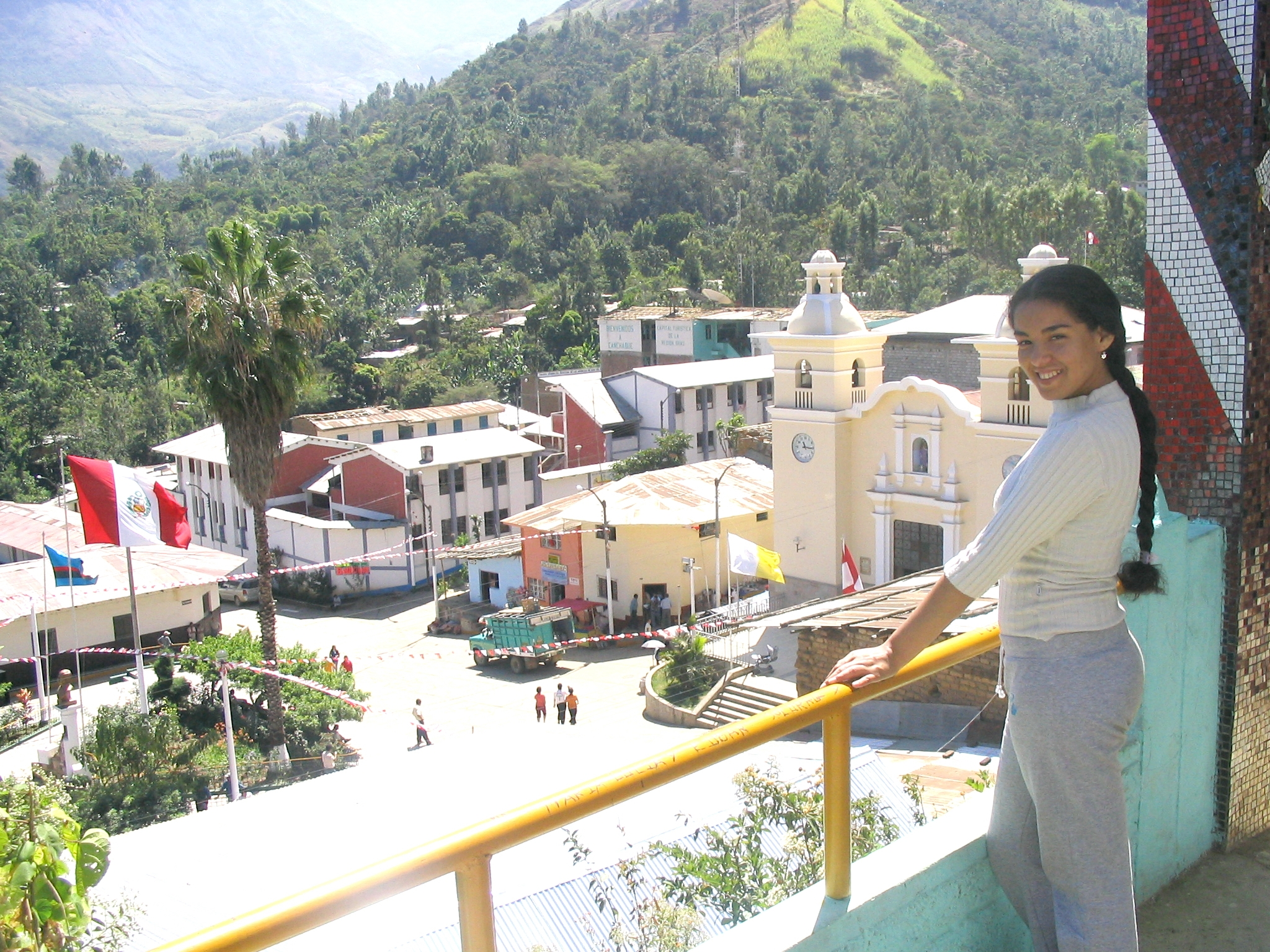 Distrito de Canchaque